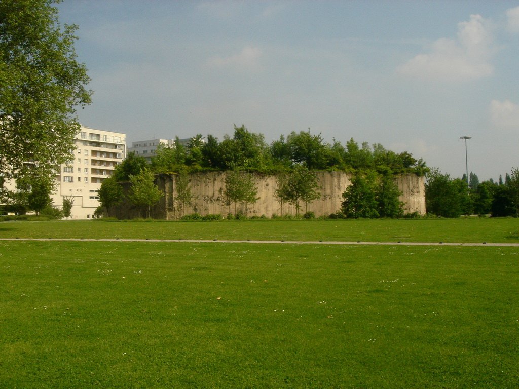 parc Matisse, Lille, L'île Derborence et le Boulingrin